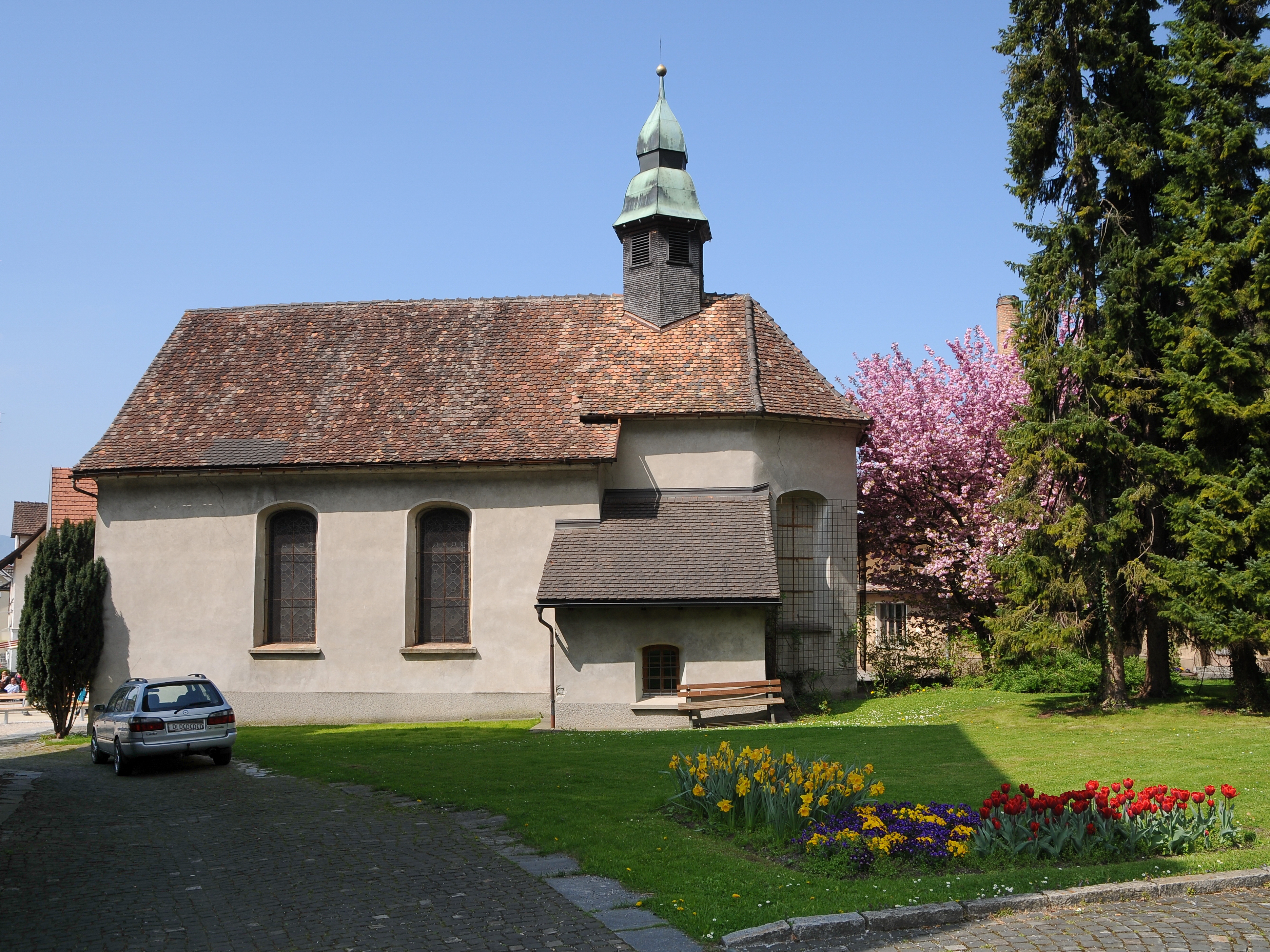 Kapelle Hl. Karl Borromäus an der St.Karl-Straße in Hohenems; Info Dieses Objekt steht unter Denkmalschutz.